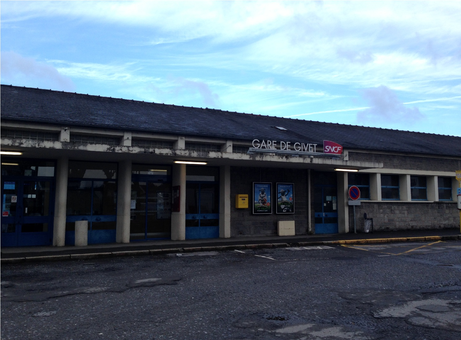 Gare de Givet-2015